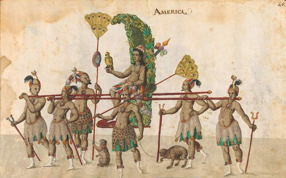 repesentacion simbolica del continte americano